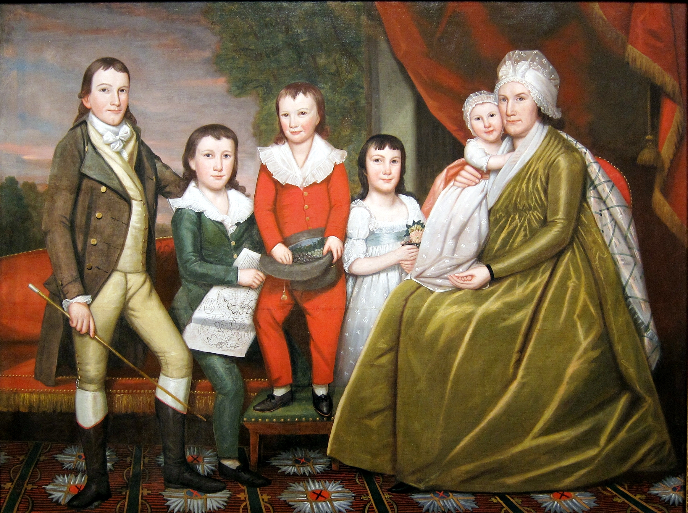 Mrs. Noah Smith and her children au Met de New York.